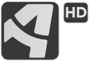 AragonHD